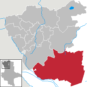 (Original text: Gardelegen im Landkreis Salzwedel)